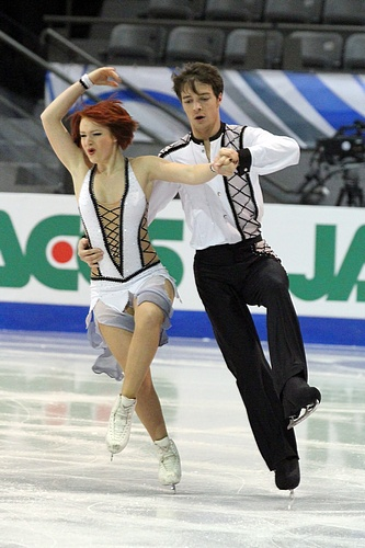 Анастасия Галета и Алексей Шумский на финале Гран-при среди юниоров сезона 2011-2012